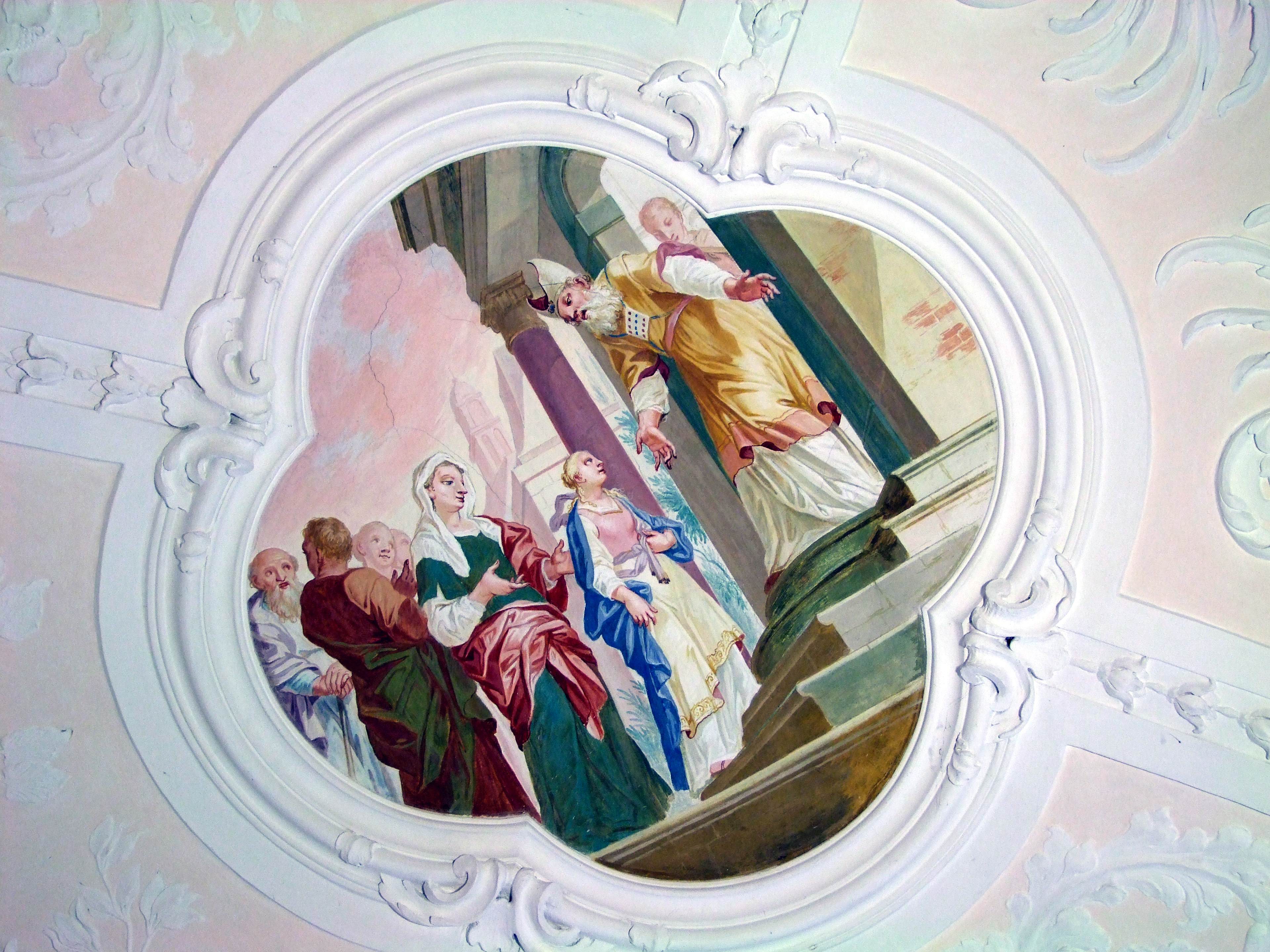 Fresko in der ehemaligen Klosterkirche der Kartause in Buxheim bei Memmingen - Google Maps - Google Earth